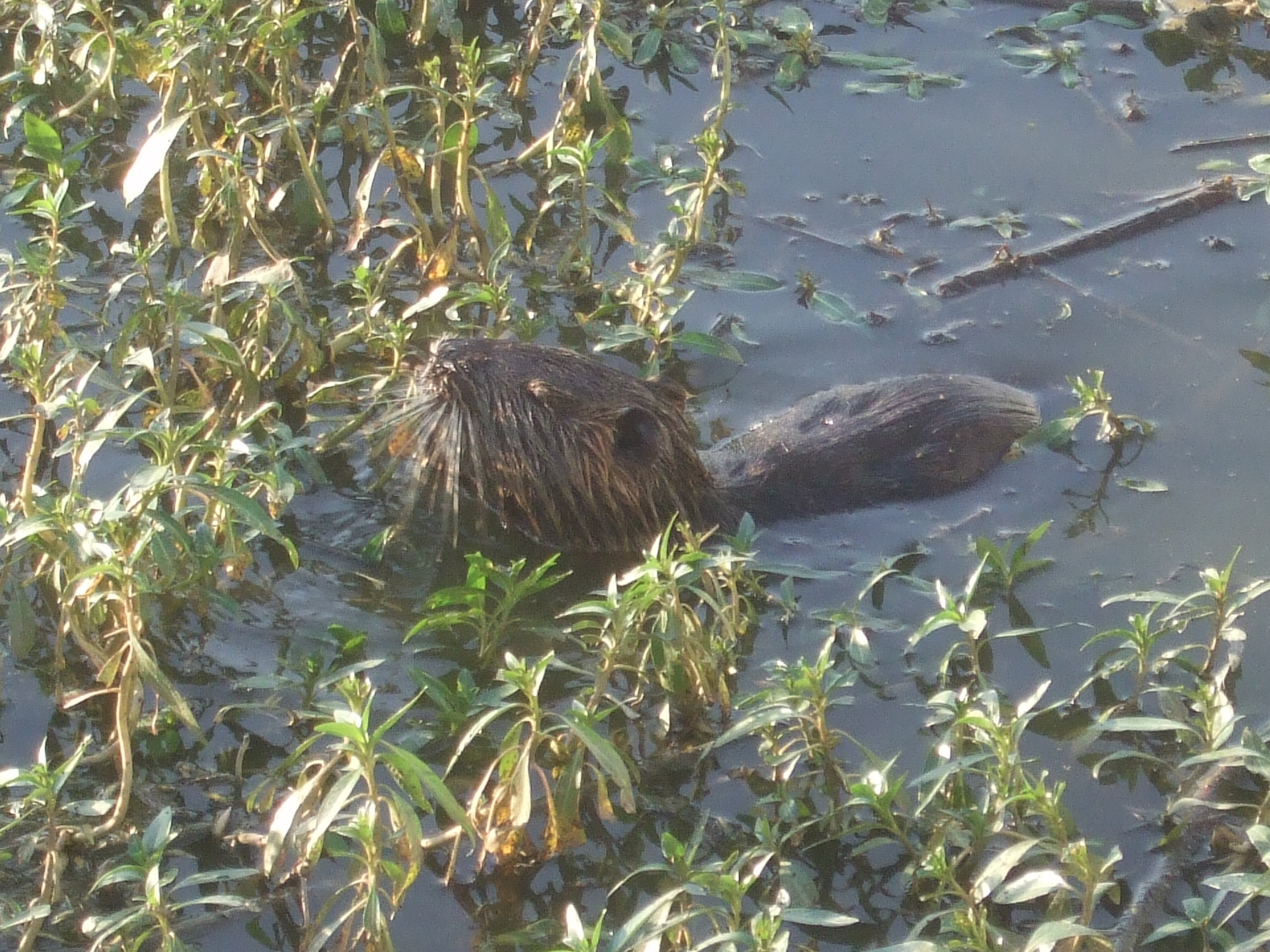 נוטרייה באגמון החולה